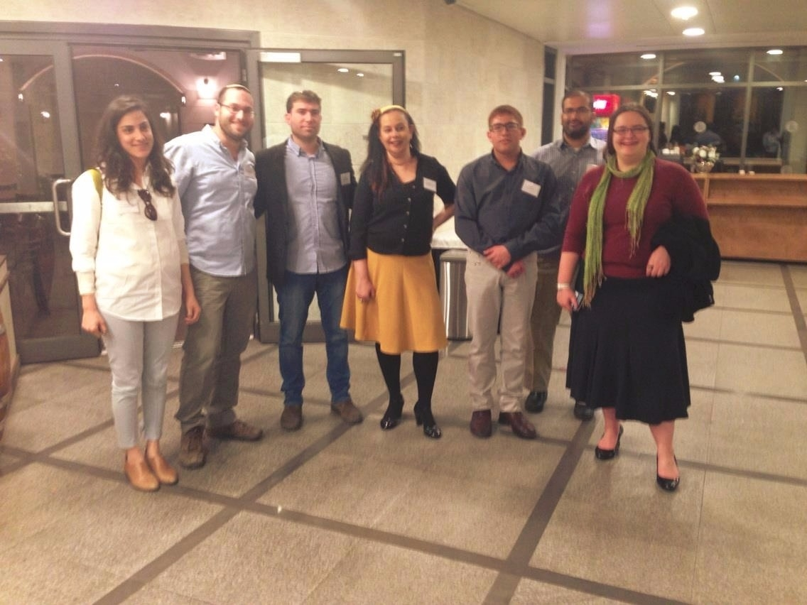 צוות המכון כיום מימין לשמאל: הדוברת גבריאלה רוזנשטיין, מנהל הפרויקטים עדי ארבל, עומר אריכא, המנכ"לית מירי שלם, מנהל תוכנית 'החלוץ' ד"ר נתי אבנרי, מנהל פרויקט 'שביל הזהב' אריאל פינקלשטיין, מנהלת 'זכויות אדם כחולבן' נוה דרומי